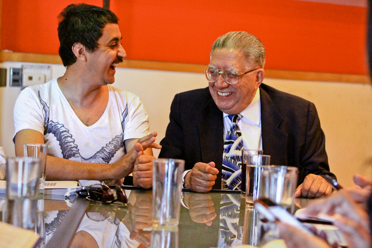 Michelle recibió apoyo de músicos chilenos 26/11/2013 Michelle Bachelet recibió apoyo de músicos chilenos